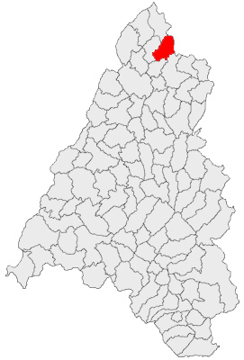 Categorie:Hărţi ale judeţului Bihor